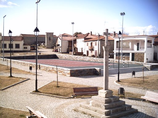 Sao pedro